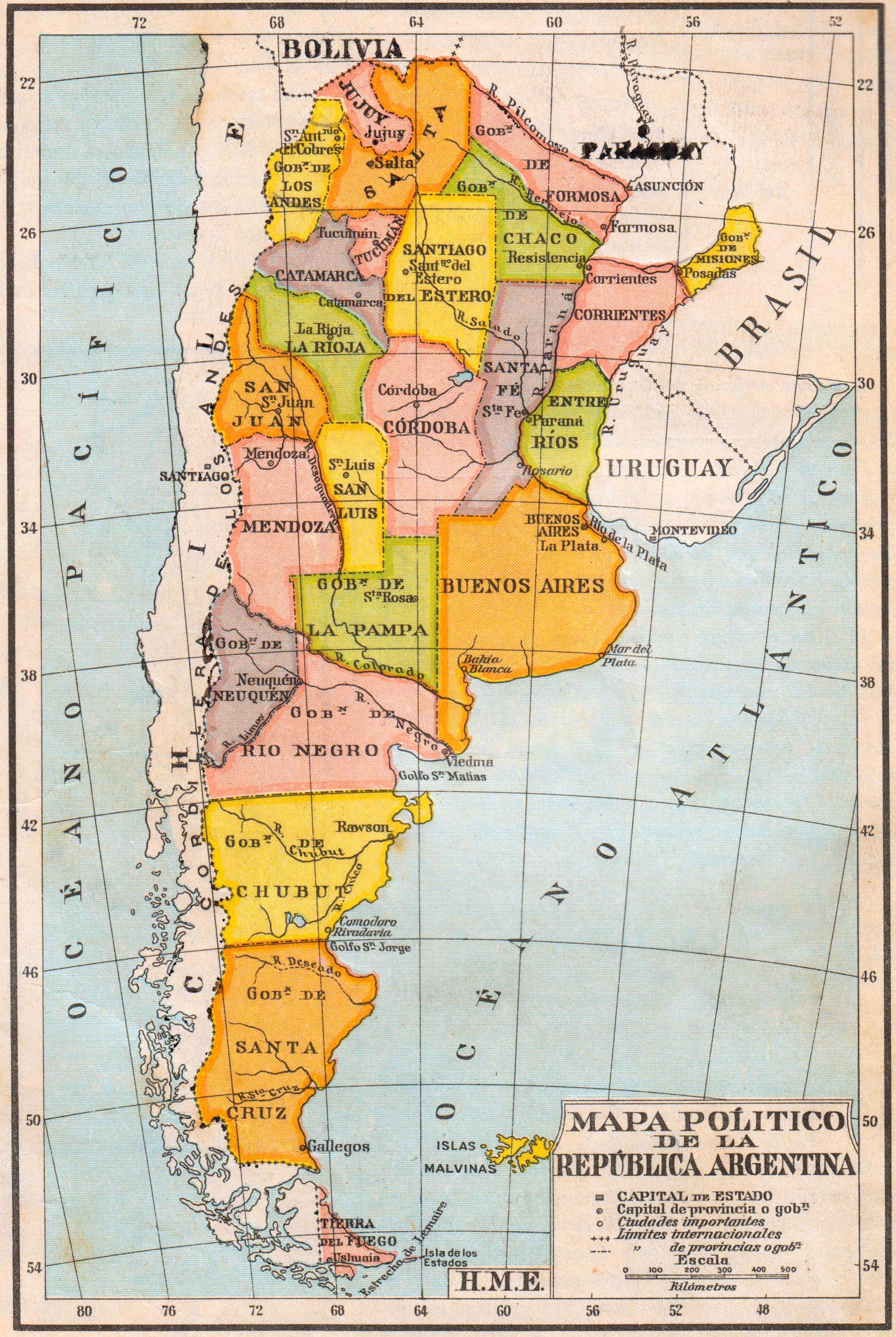 Mapa político de la República Argentina, cerca de 1940.